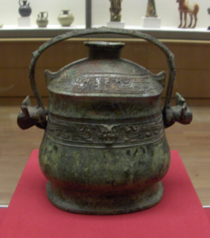 Museum für Ostasiatische Kunst Berlin Photo: Louis le Grand, 03.01.2006